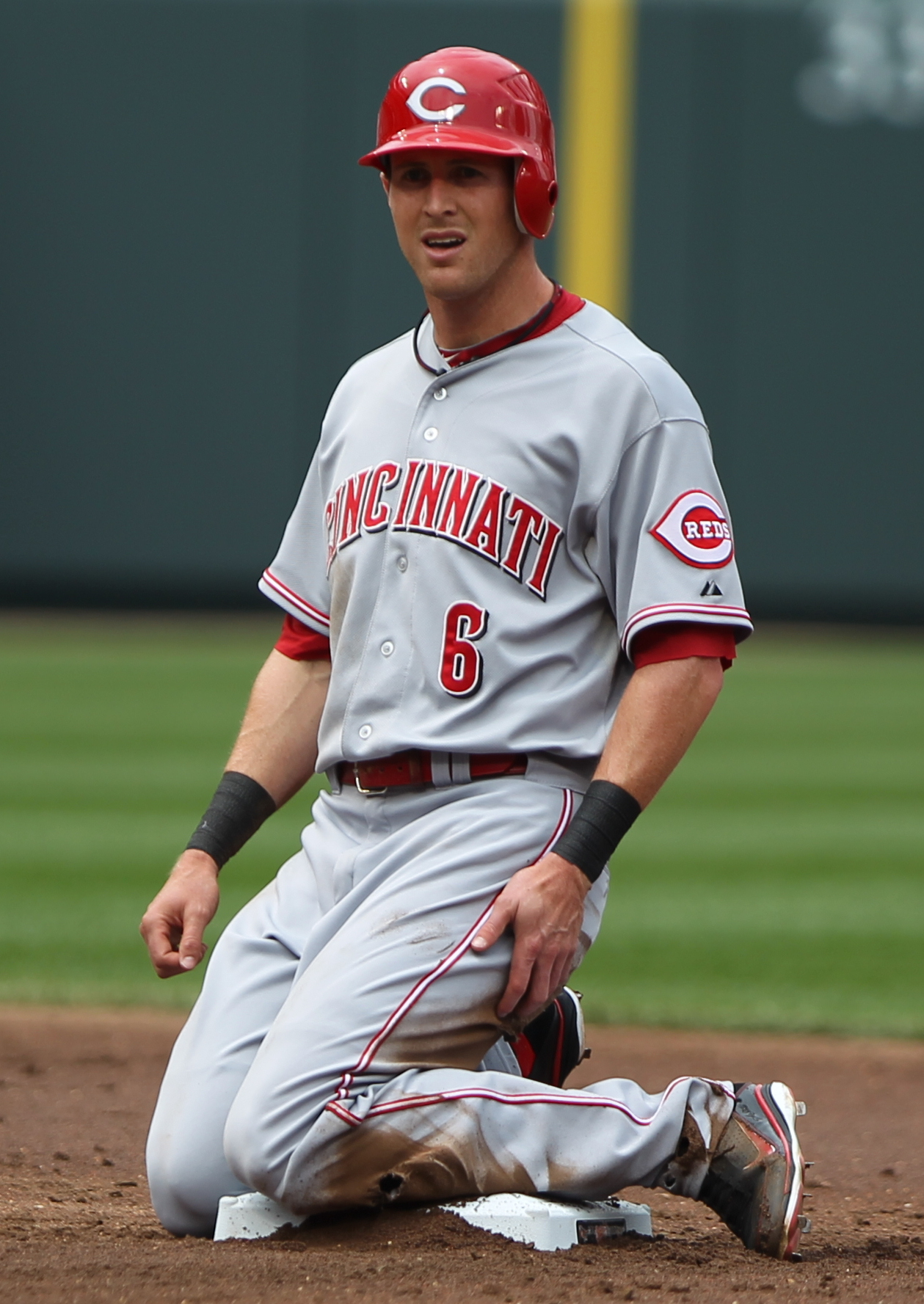 Drew Stubbs